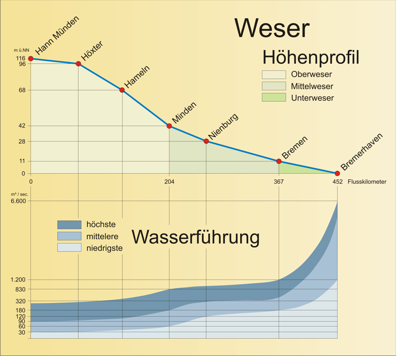 Höhenprofil und Wassermenge der Weser - selbst erstellt 11/2005 - GNU-FDL